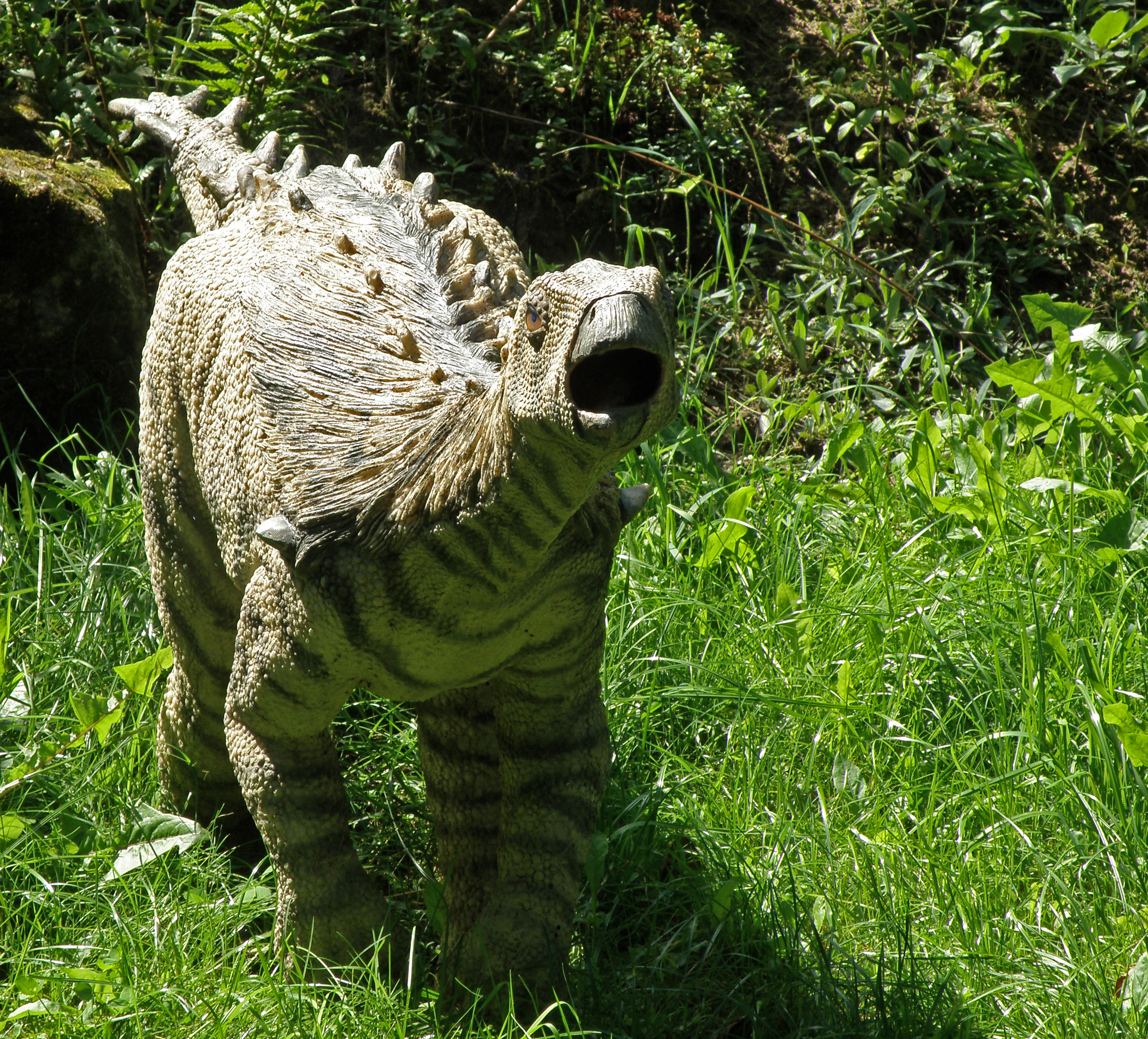 JuraPark Bałtów - Park Dinozaurów - Kentrosaurus aethiopicus